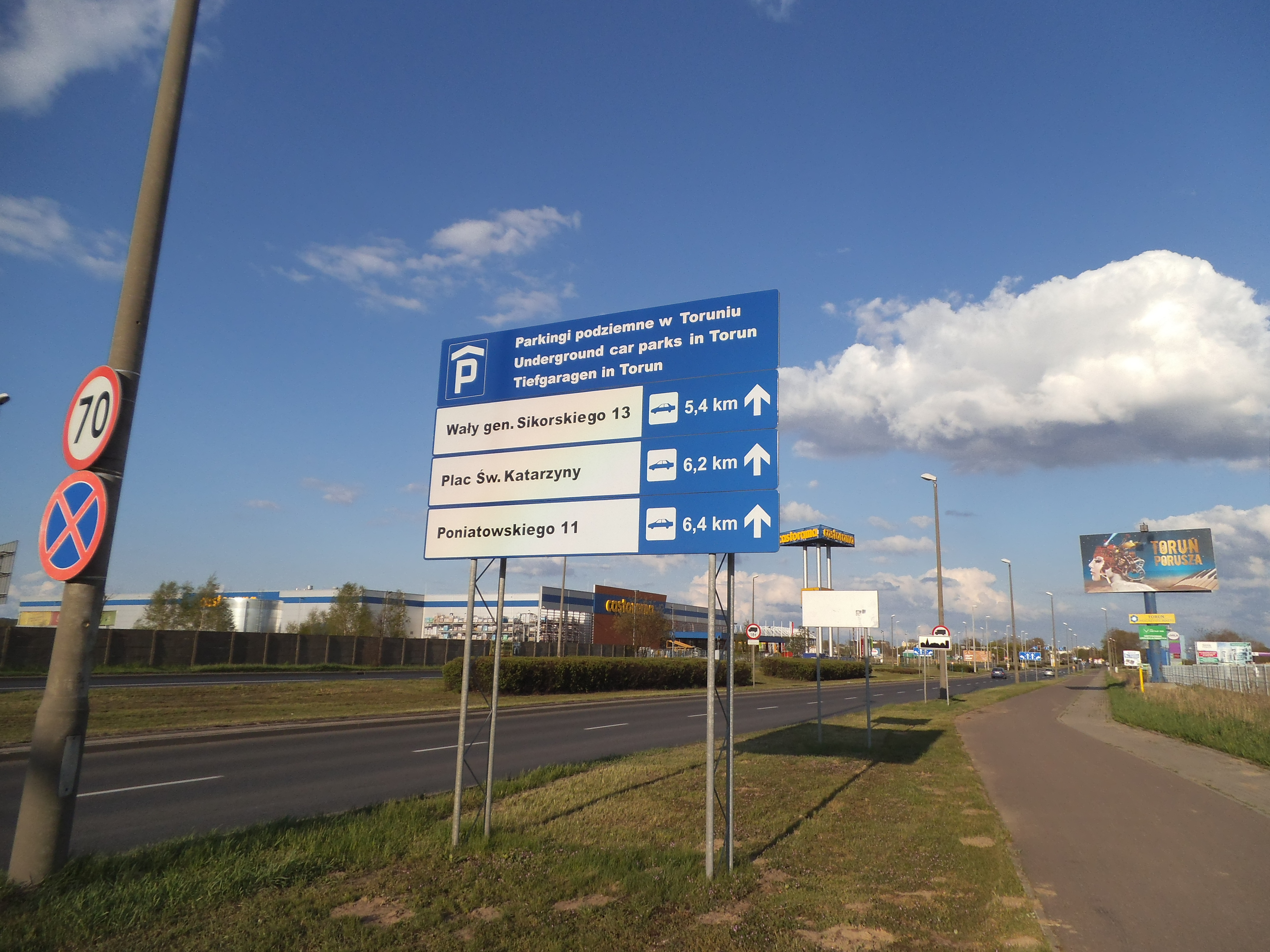 Droga krajowa nr 80 (Toruń)